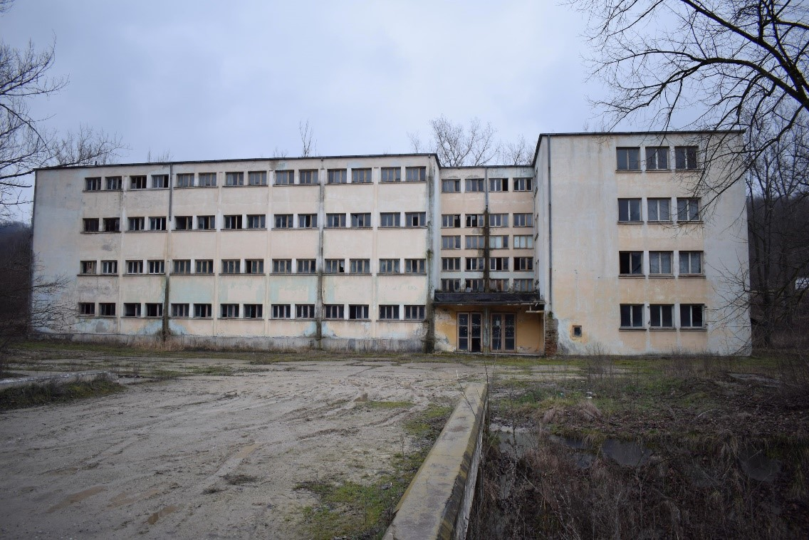 Mina Horăști după 60 de ani.